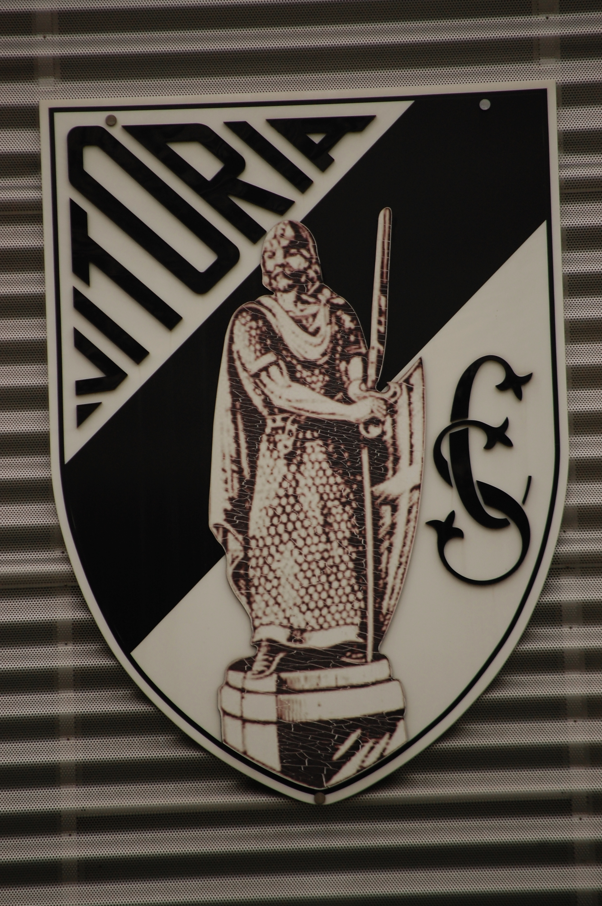 Logo do Vitória Sport Club no exterior do Estádio D. Afonso Henriques.